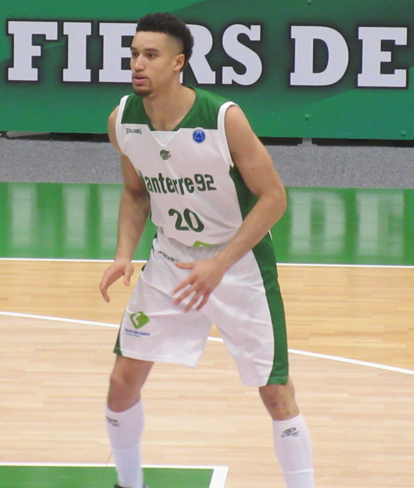 Jean-Frédéric Morency avec le maillot de Nanterre 92.